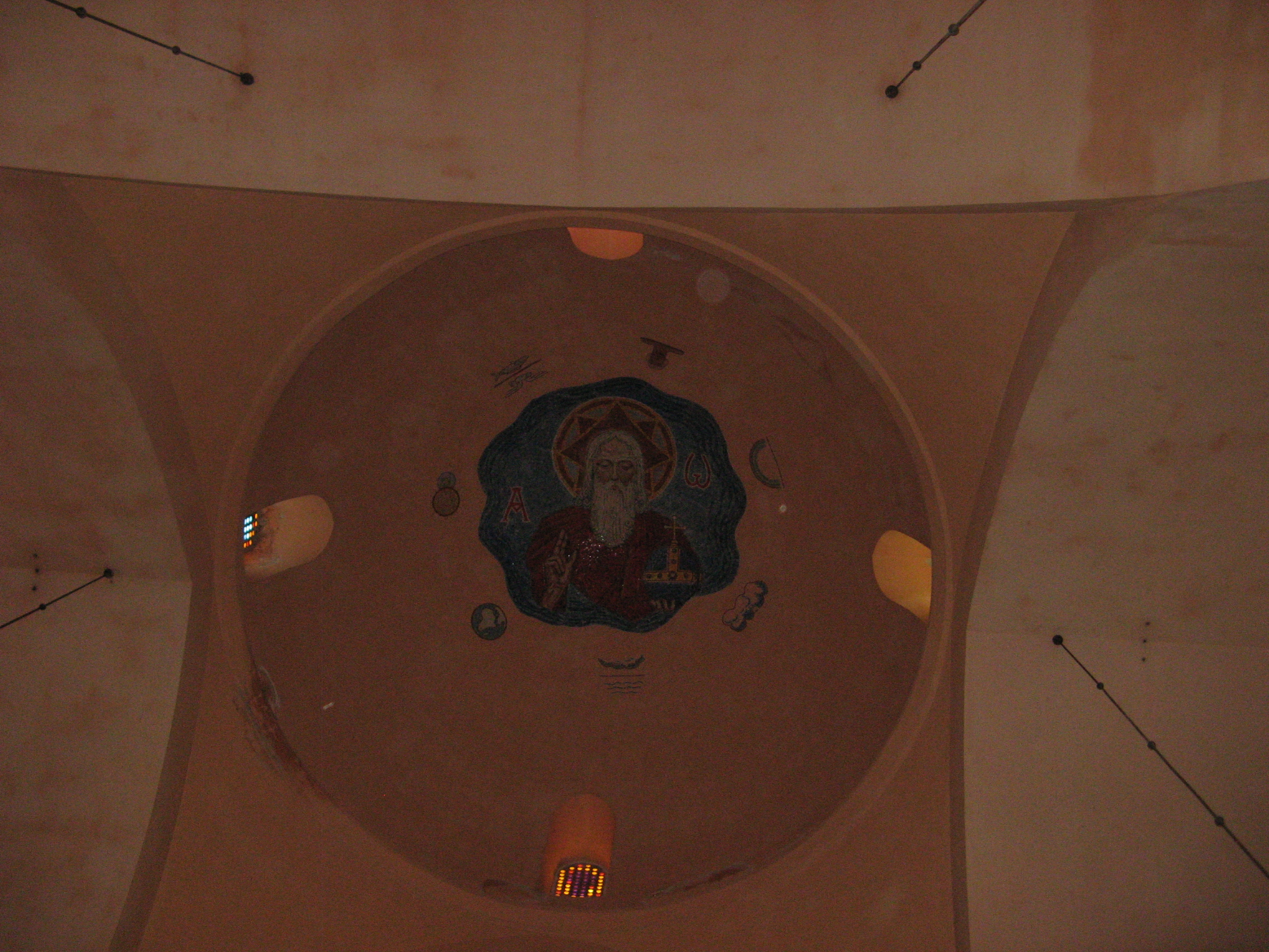 כנסיית גבירתנו של הכרמל